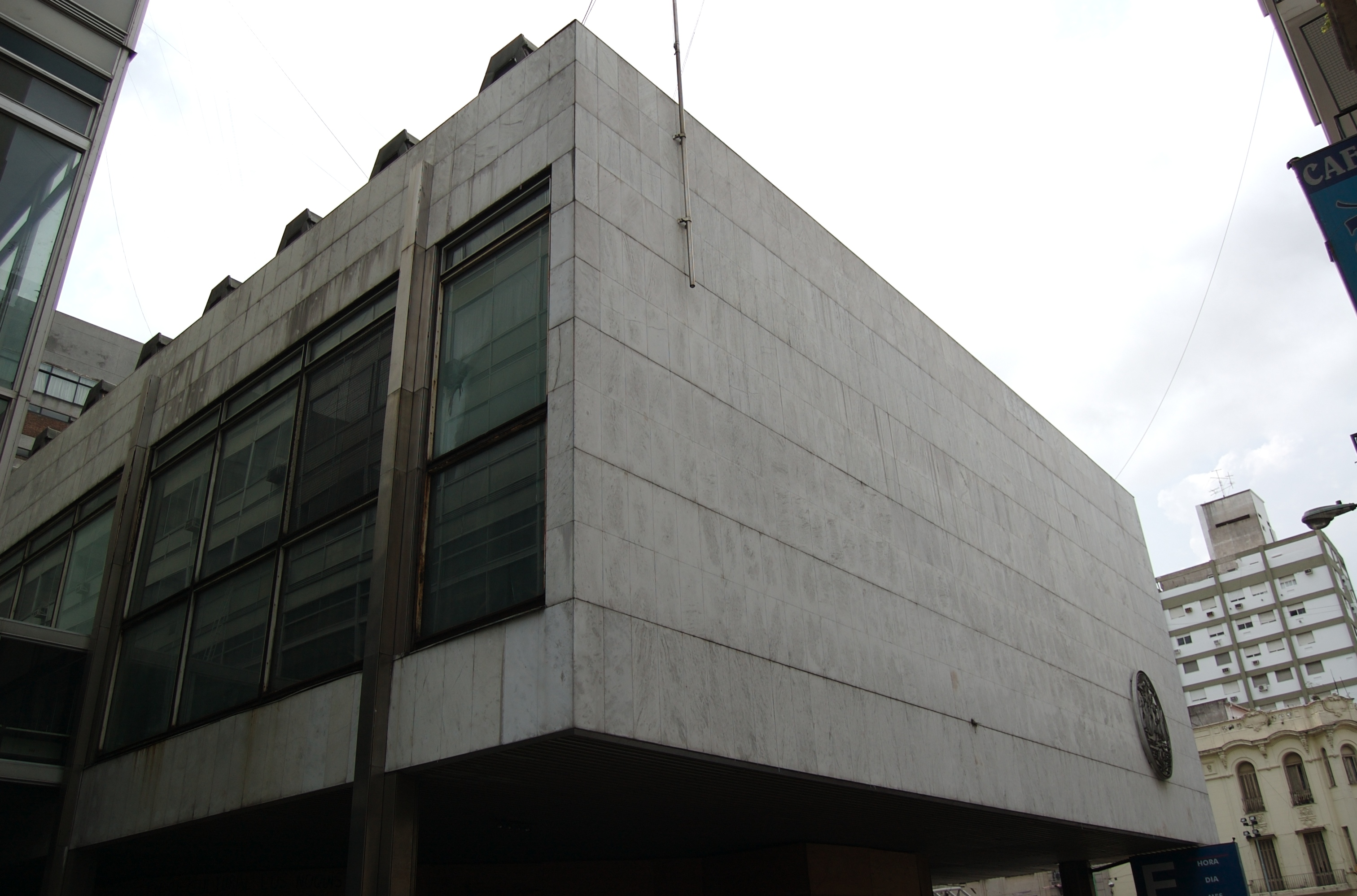 Centro Cultural General San Martin, Buenos Aires, Argentina.